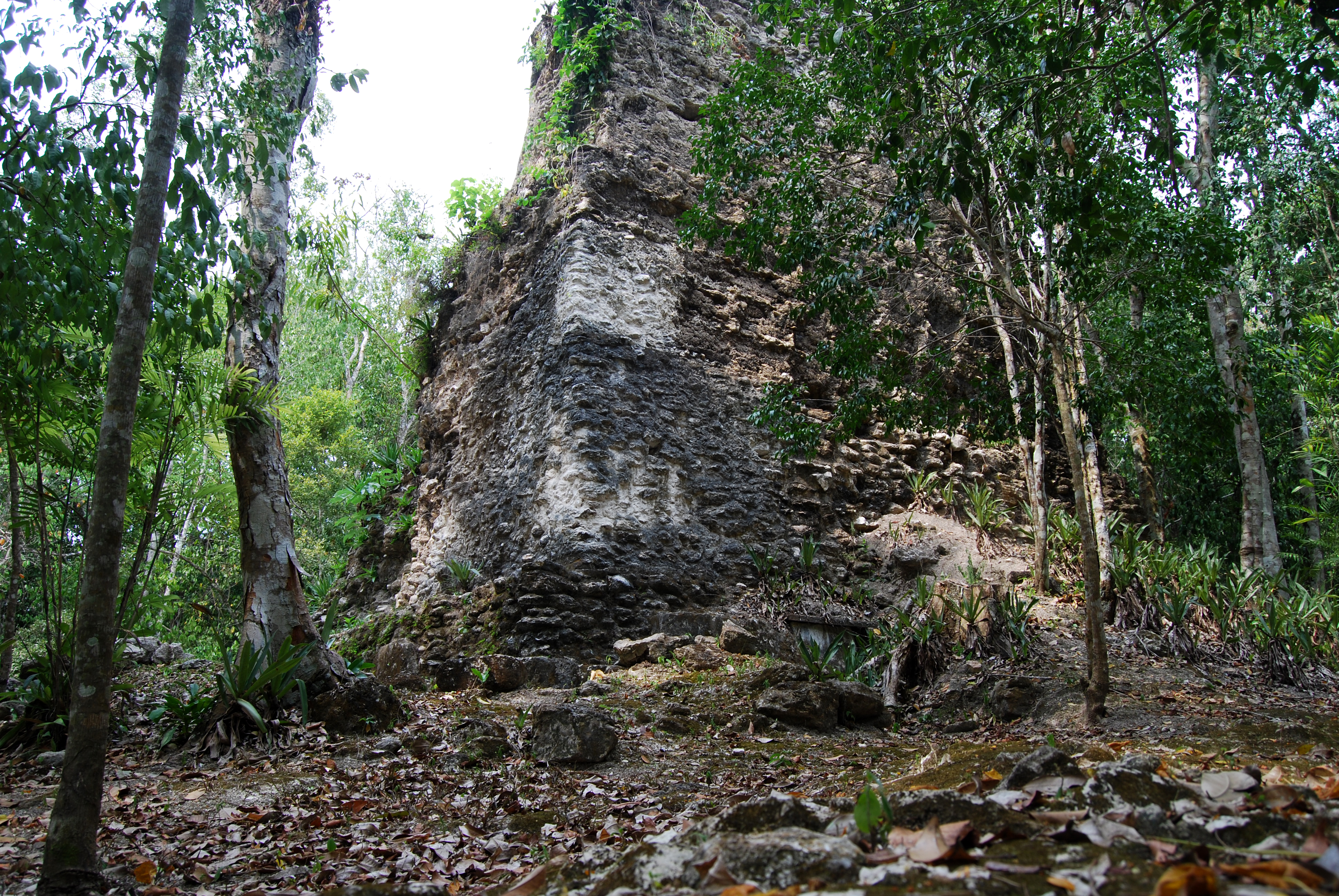 La Muerta, El Petén